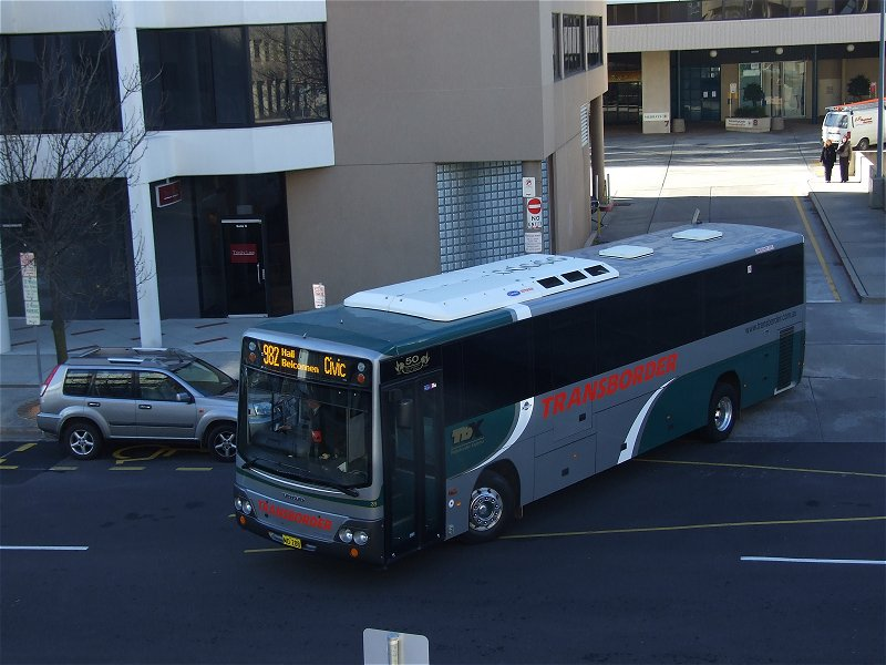 Volvo bus in Australia.